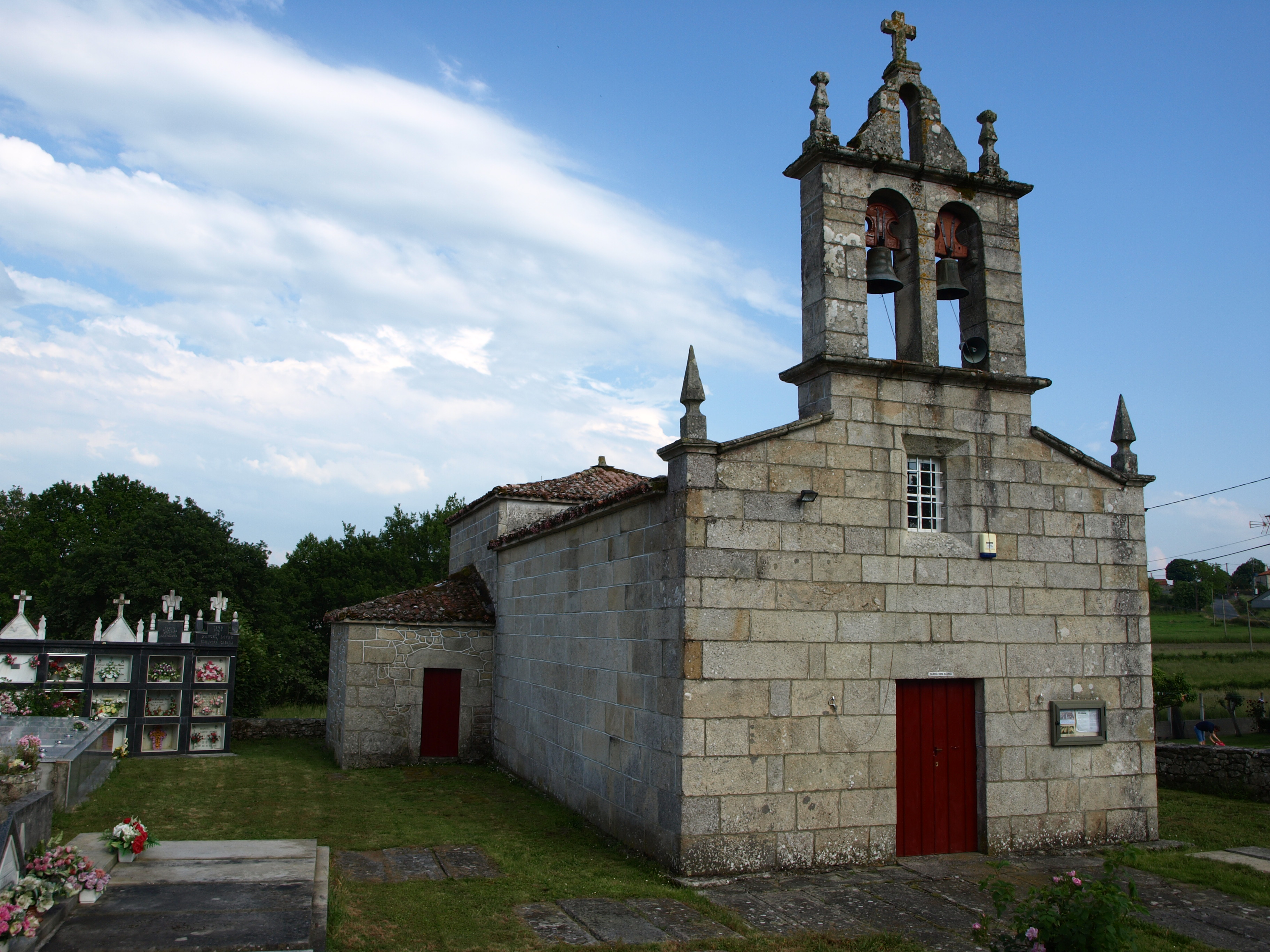 Igrexa parroquial de Santiago de Dorra (Antas de Ulla)